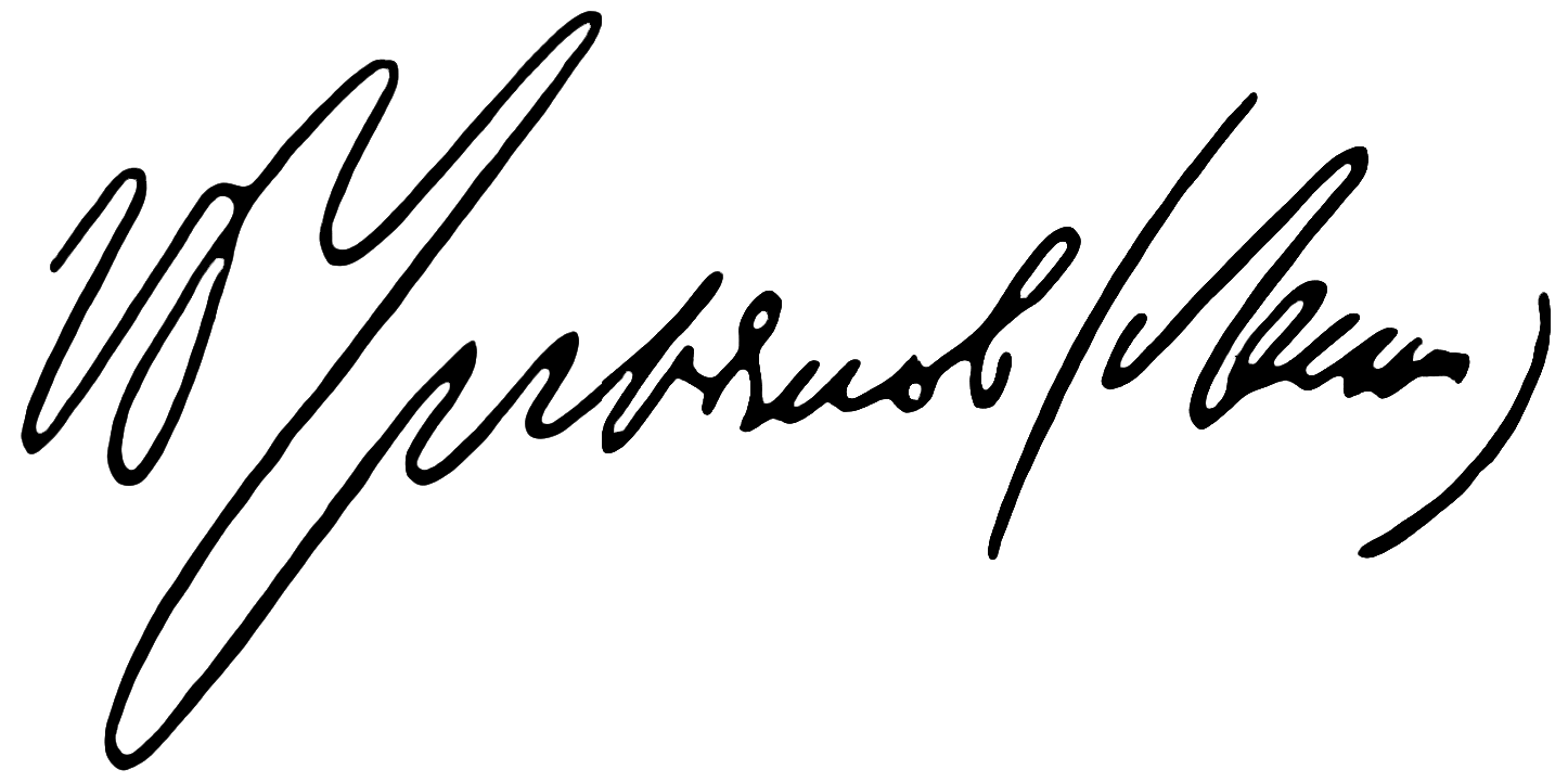 Lenins Unterschrift. Quelle: Plakat von 1921 anläßlich Gründung der Sowjetunion